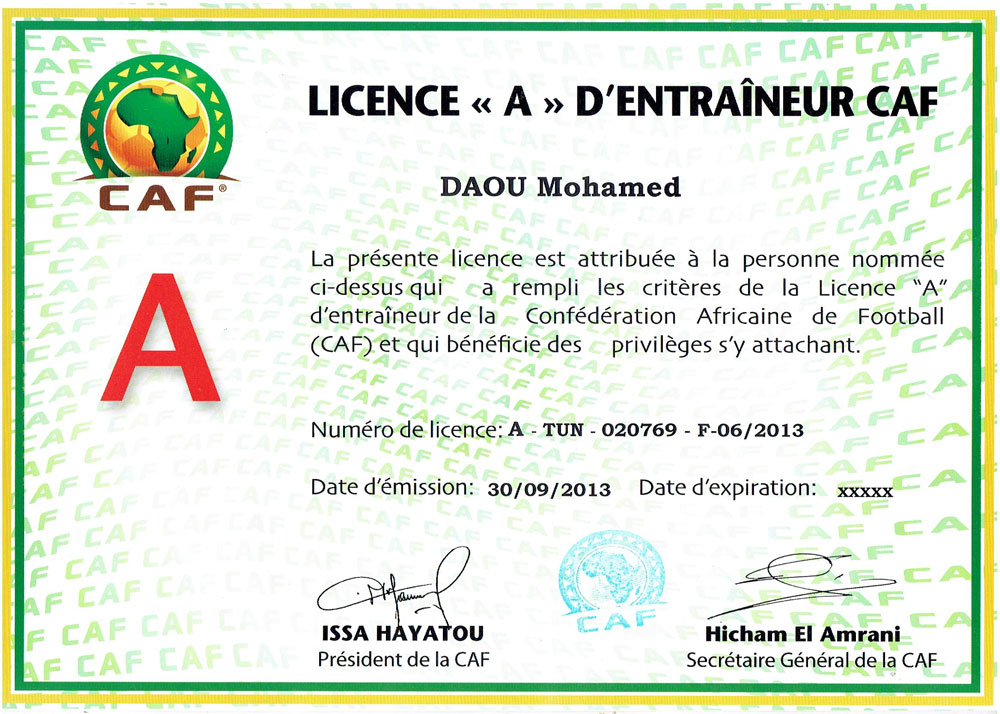 diplome CAFA